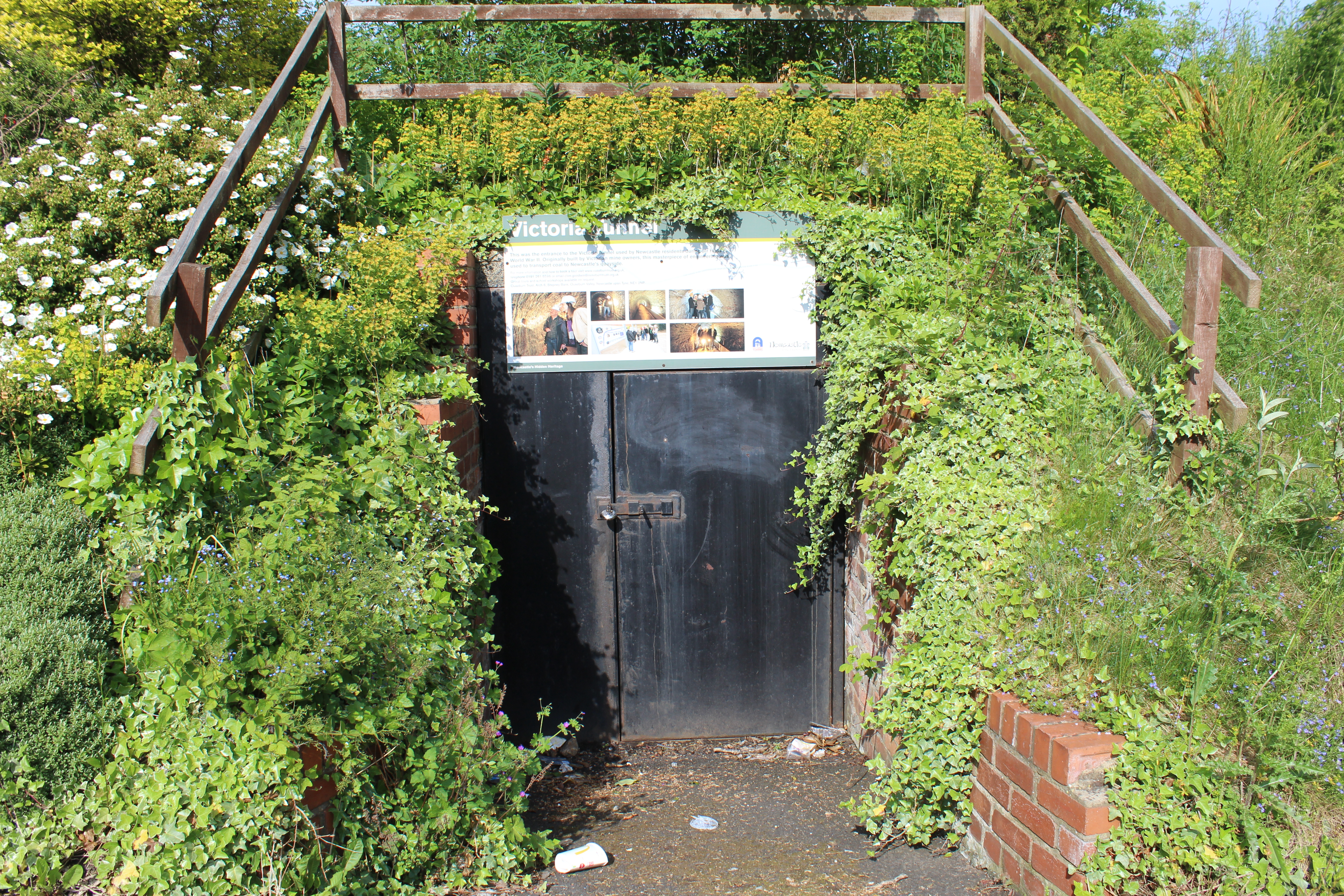 Entrée du tunnel Victoria, Newcastle upon Tyne.